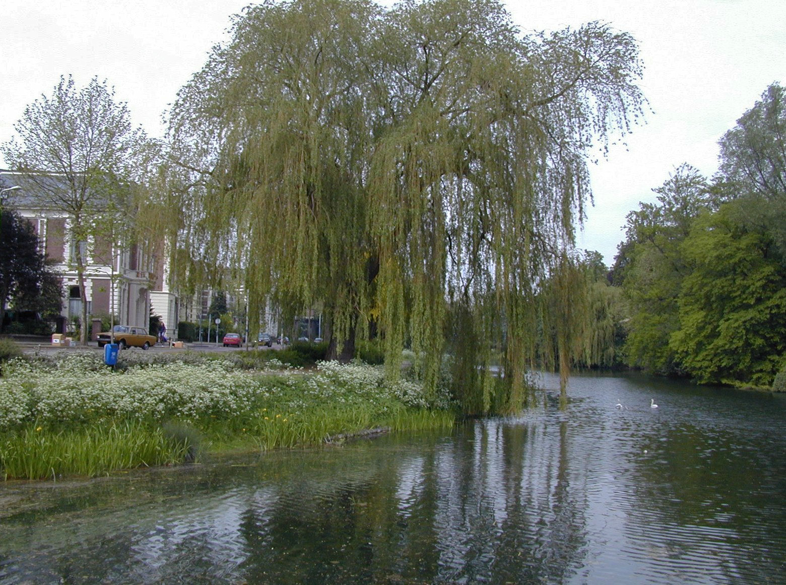 Rijsterborgherpark of Oude Plantsoen: Overzicht met Buitengracht en zicht op de Singel